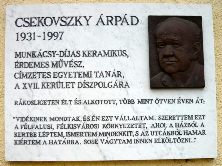 Csekovszky Árpád emlékplakett, a Csekovszky Árpád Művelődési Ház oldalán, Budapest, XVII. kerület